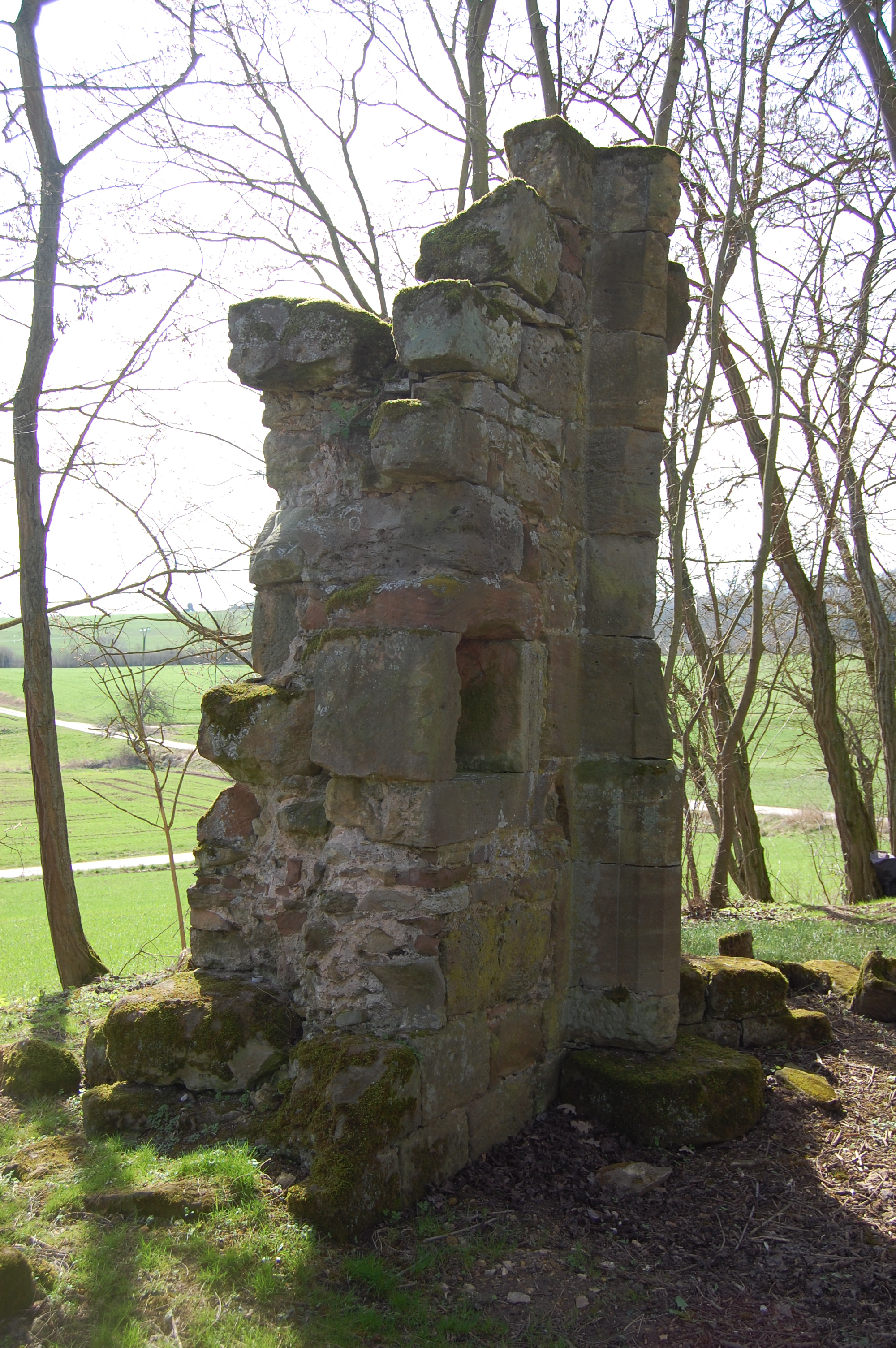 Rest eines Wandpfeilers des Chors der ehemaligen Kreuzkirche